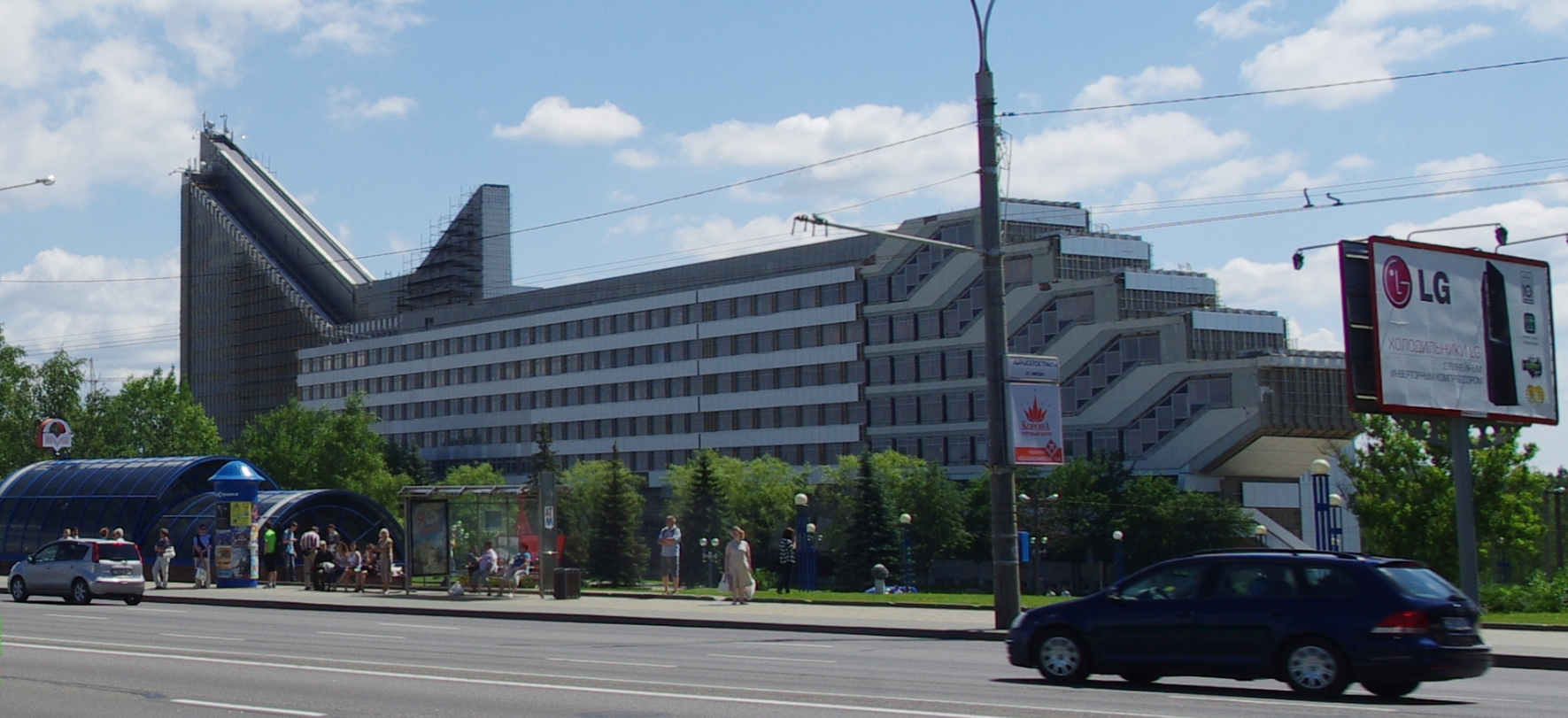 Minsk, Belarus